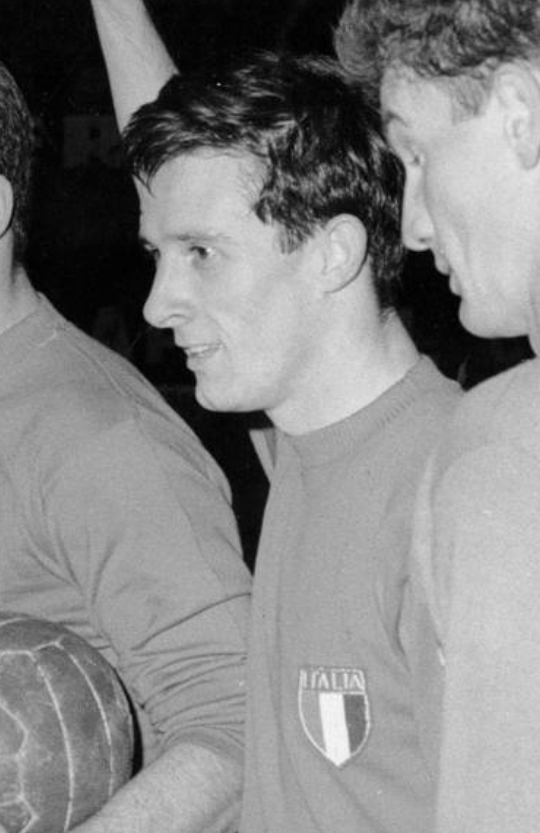 Romano Fogli con Italia en 1962